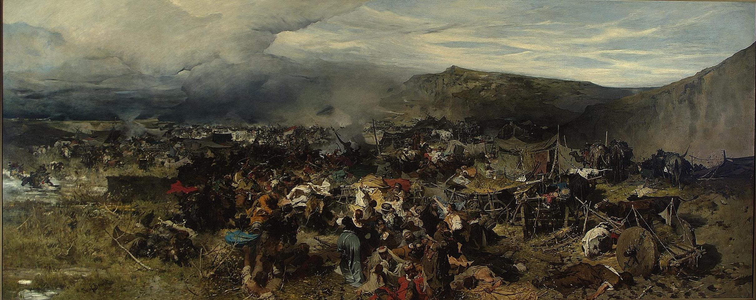 label QS:Lpl,"Odbicie jasyru."